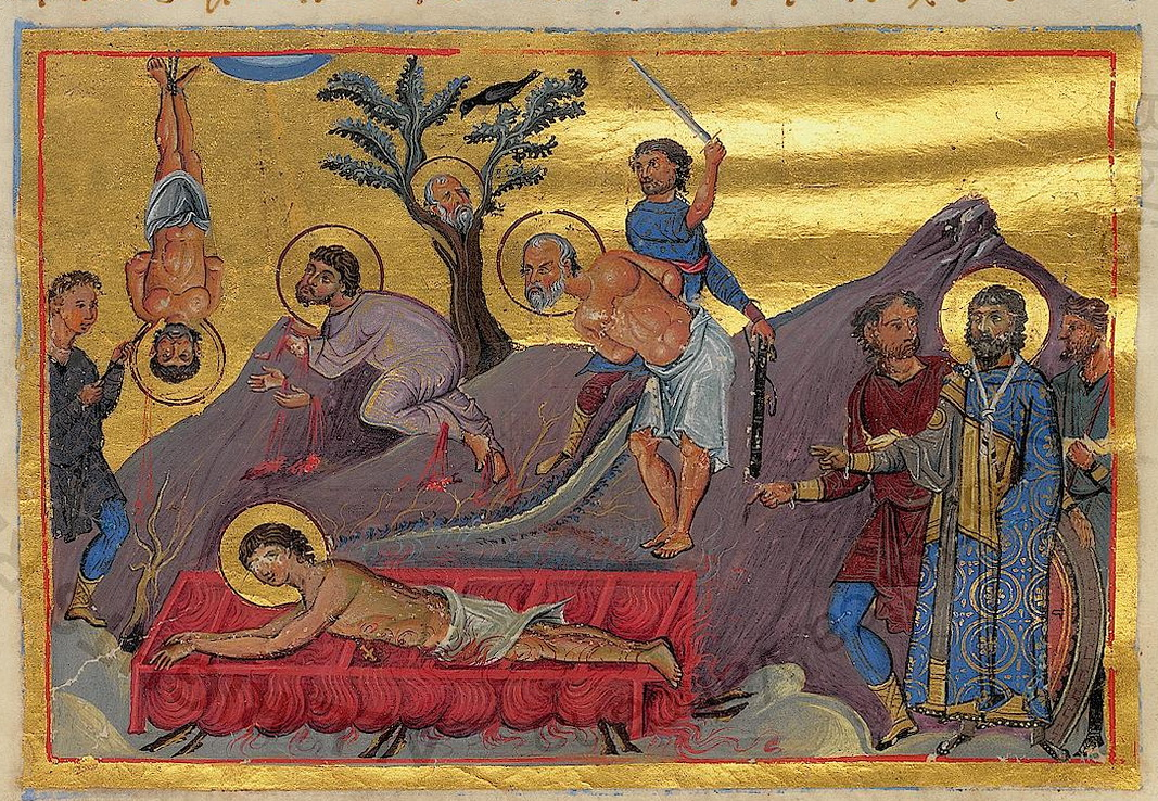 ЕВСТРАТИЙ, АВКСЕНТИЙ, ЕВГЕНИЙ, МАРДАРИЙ И ОРЕСТ. Казнь мучеников Севастийских. Миниатюра из Минология Василия II. 976-1025 гг. (Vat. gr. 1613. P. 241) // Eustratius, Auxentius, Eugene, Mardarius and Orestes